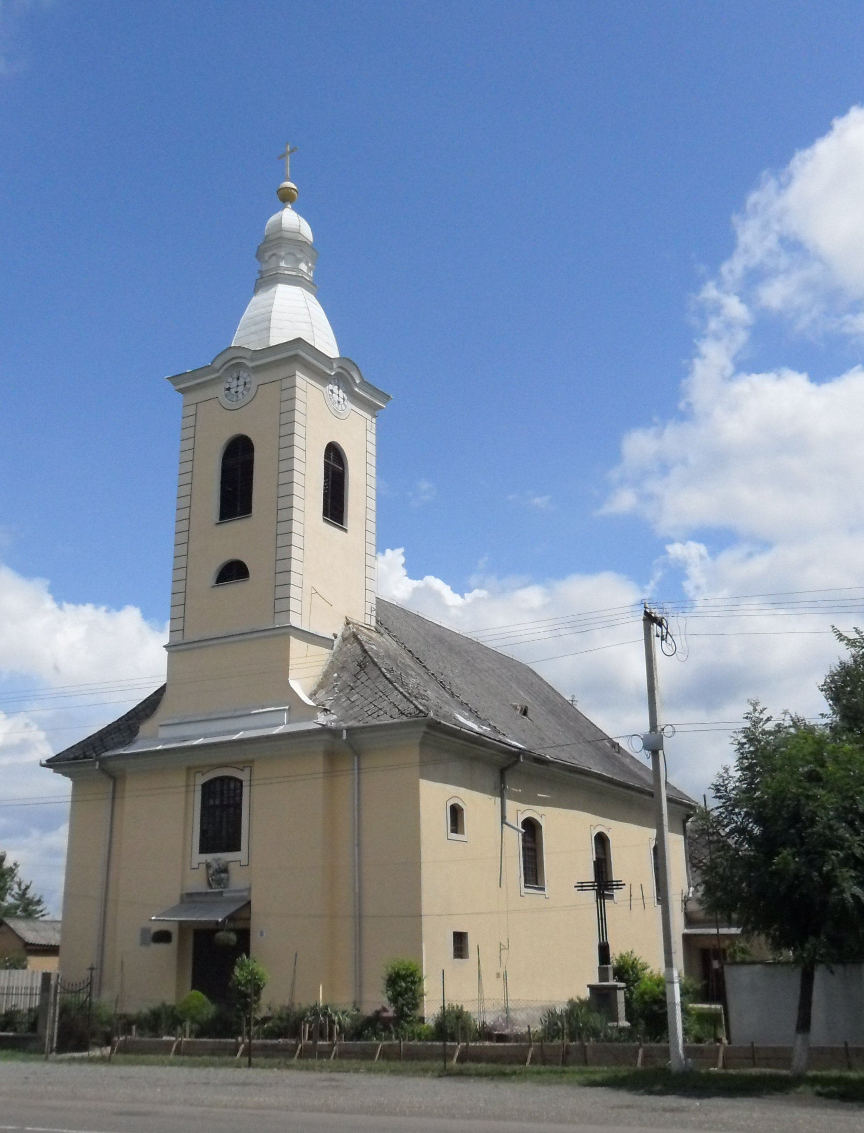 A tiszaújlaki római katolikus templom (Kárpátalja, Ukrajna)